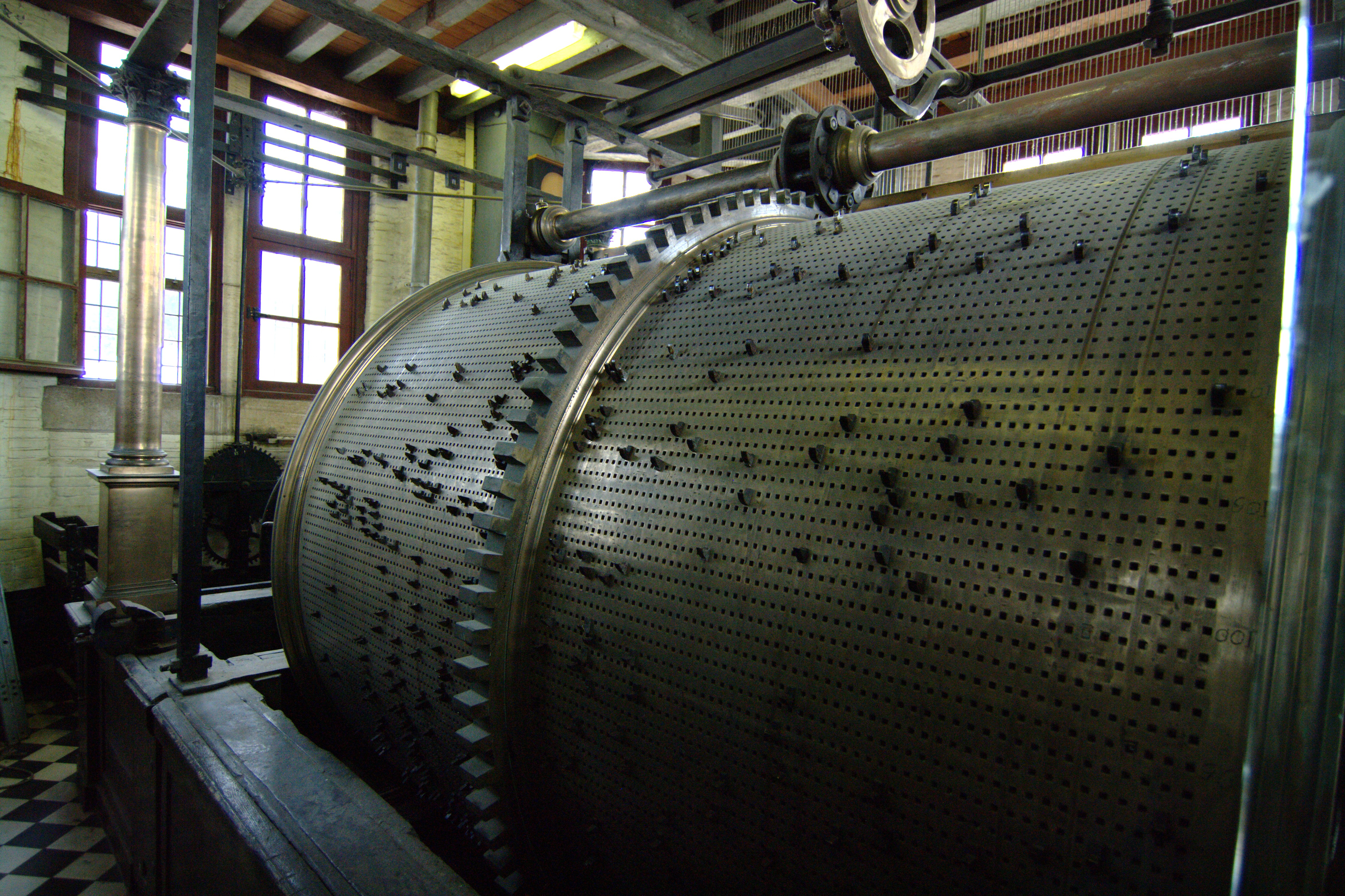 Mécanisme de l'horloge du beffroi de Bruges, Belgique; détail du tambour actionnant les marteaux des cloches sonnant les heures.